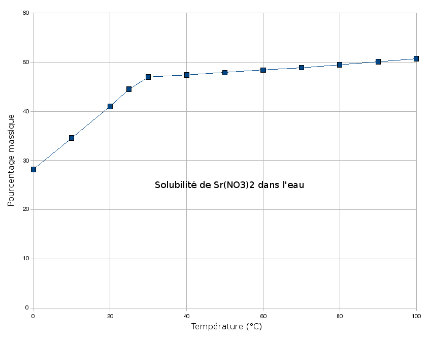 Solubilité de Sr(NO3)2 dans l'eau en fonction de la température.